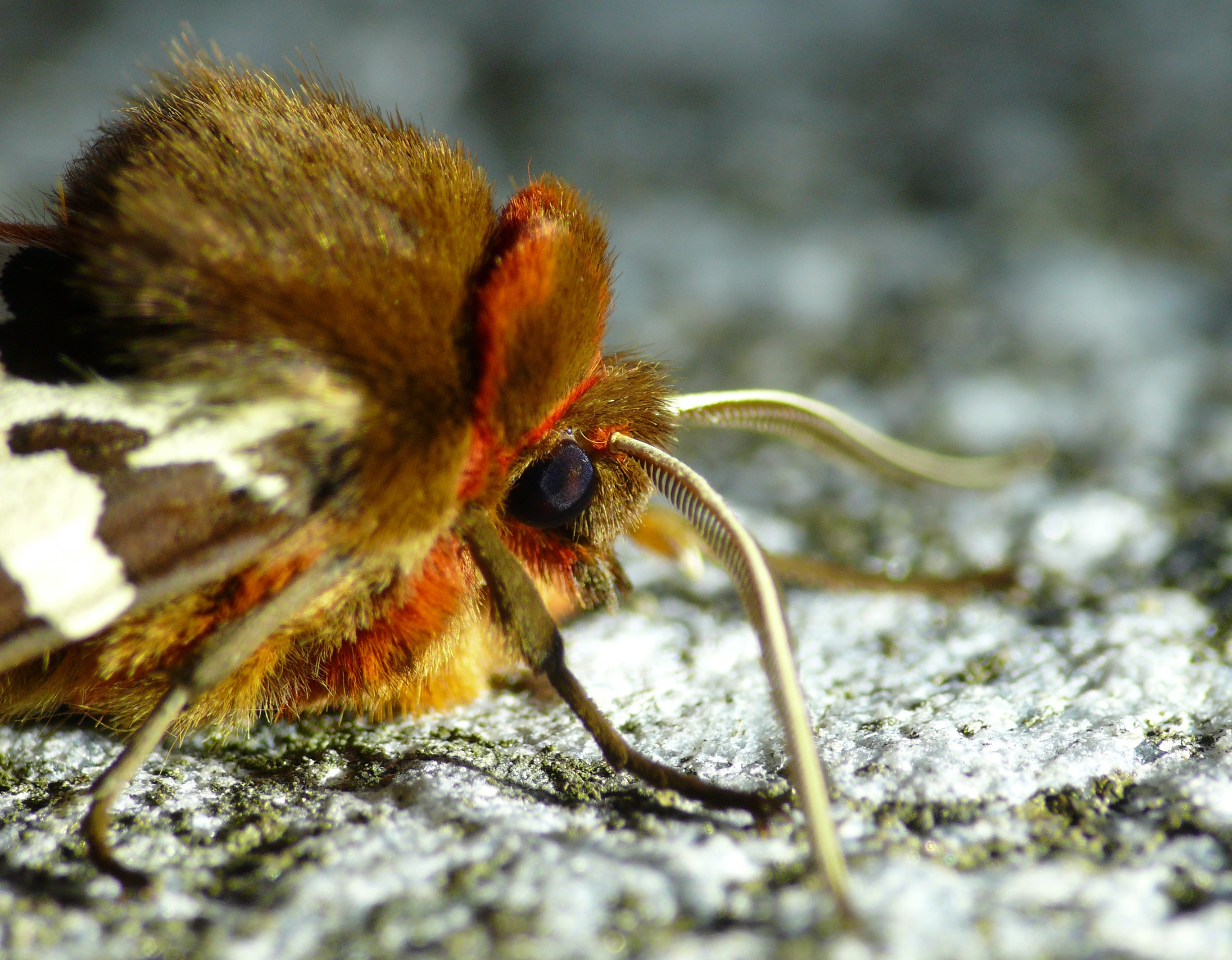 Arctia caja